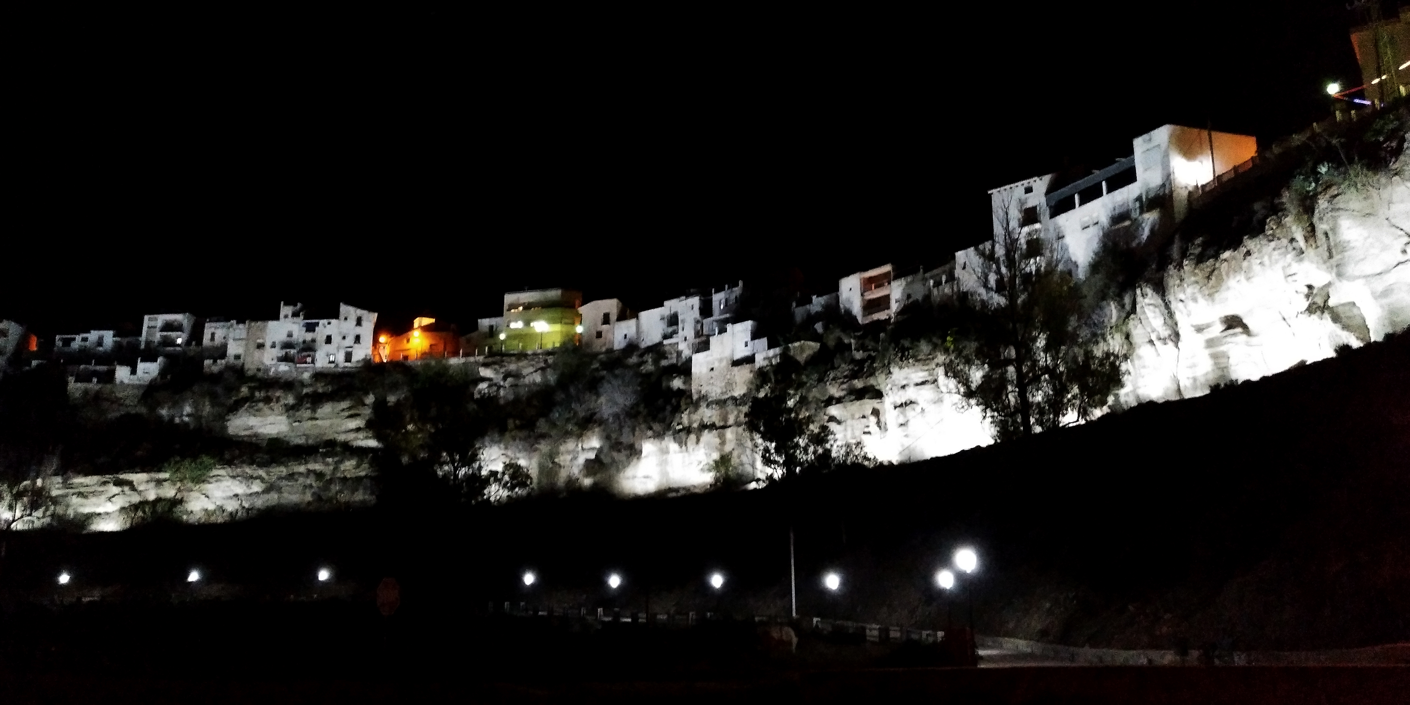 Vista del denominado "Afa" iluminado.